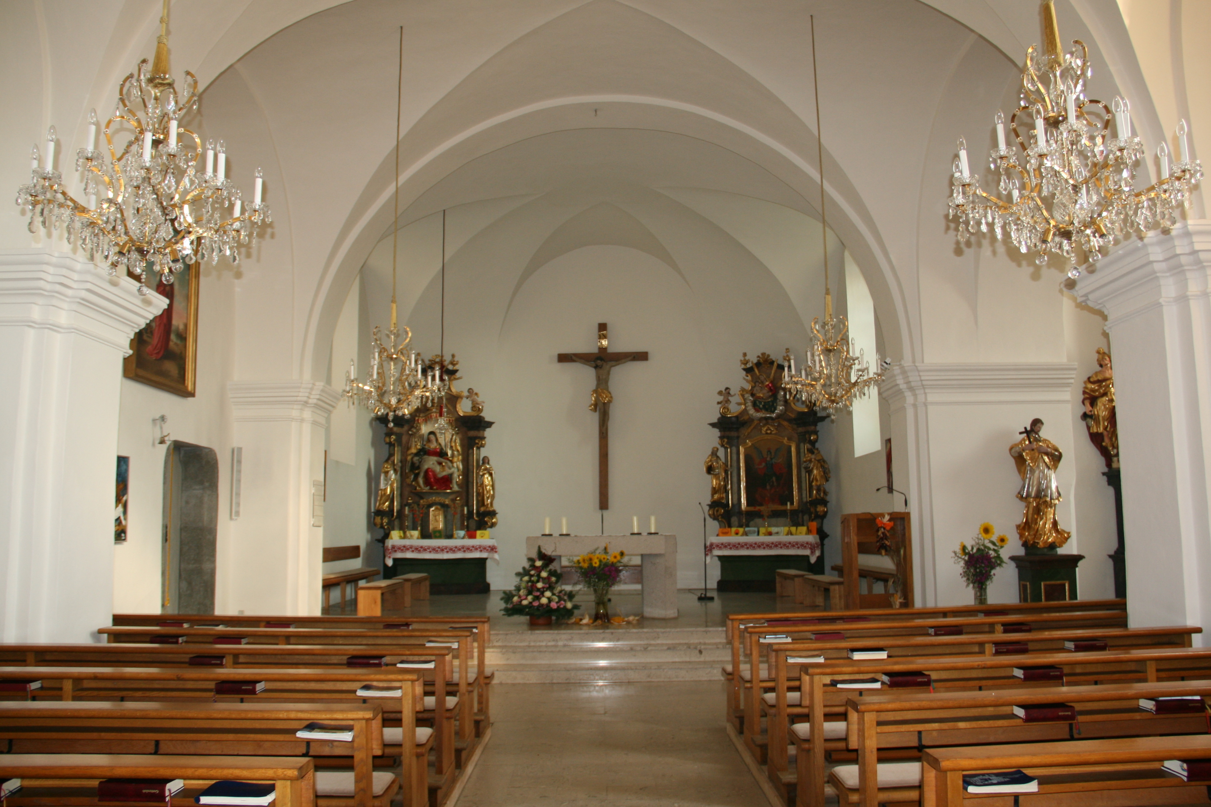 Kath. Pfarrkirche hl. Bartholomäus